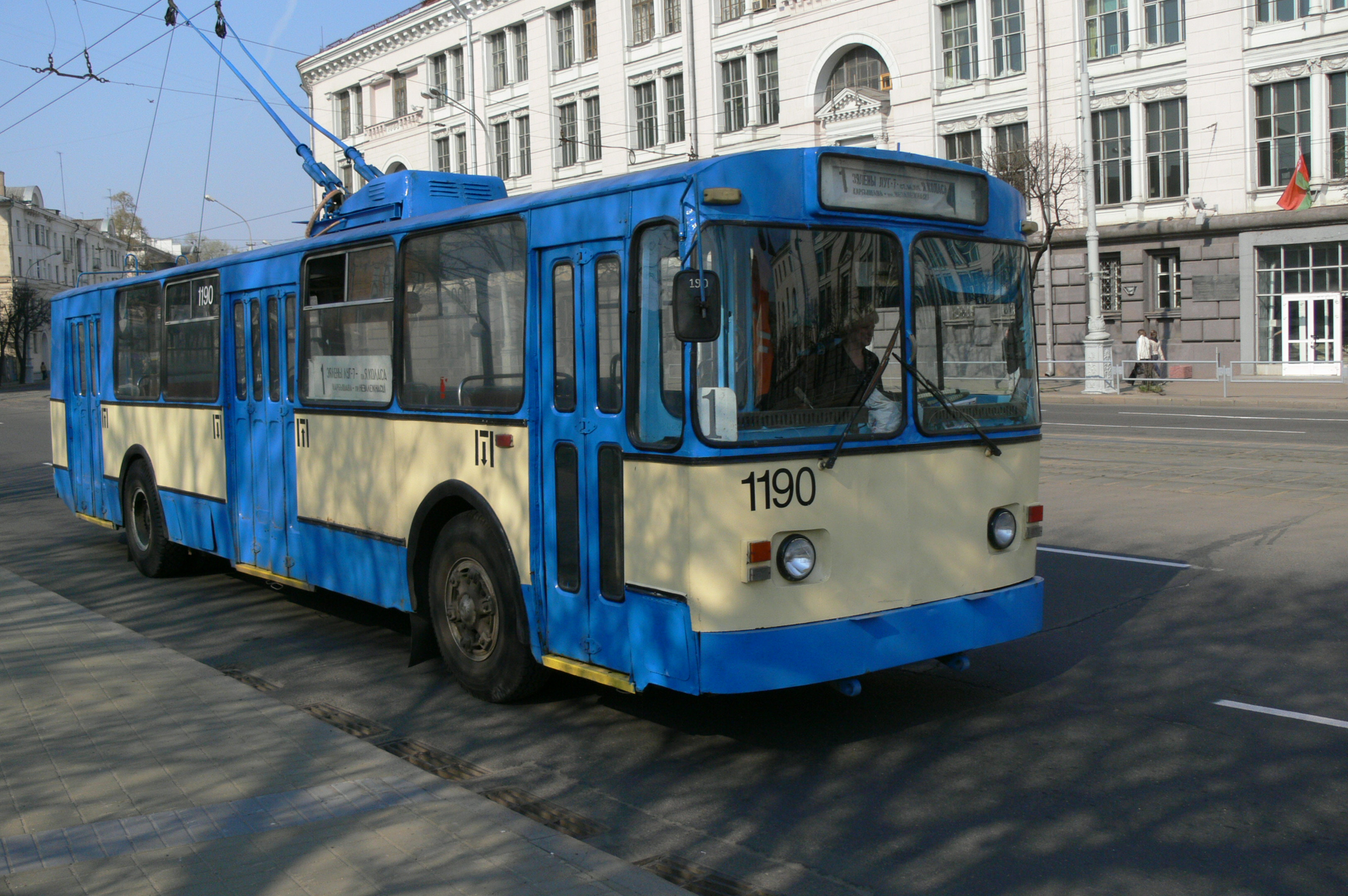 Trolleybus ZiU-682v in Minsk